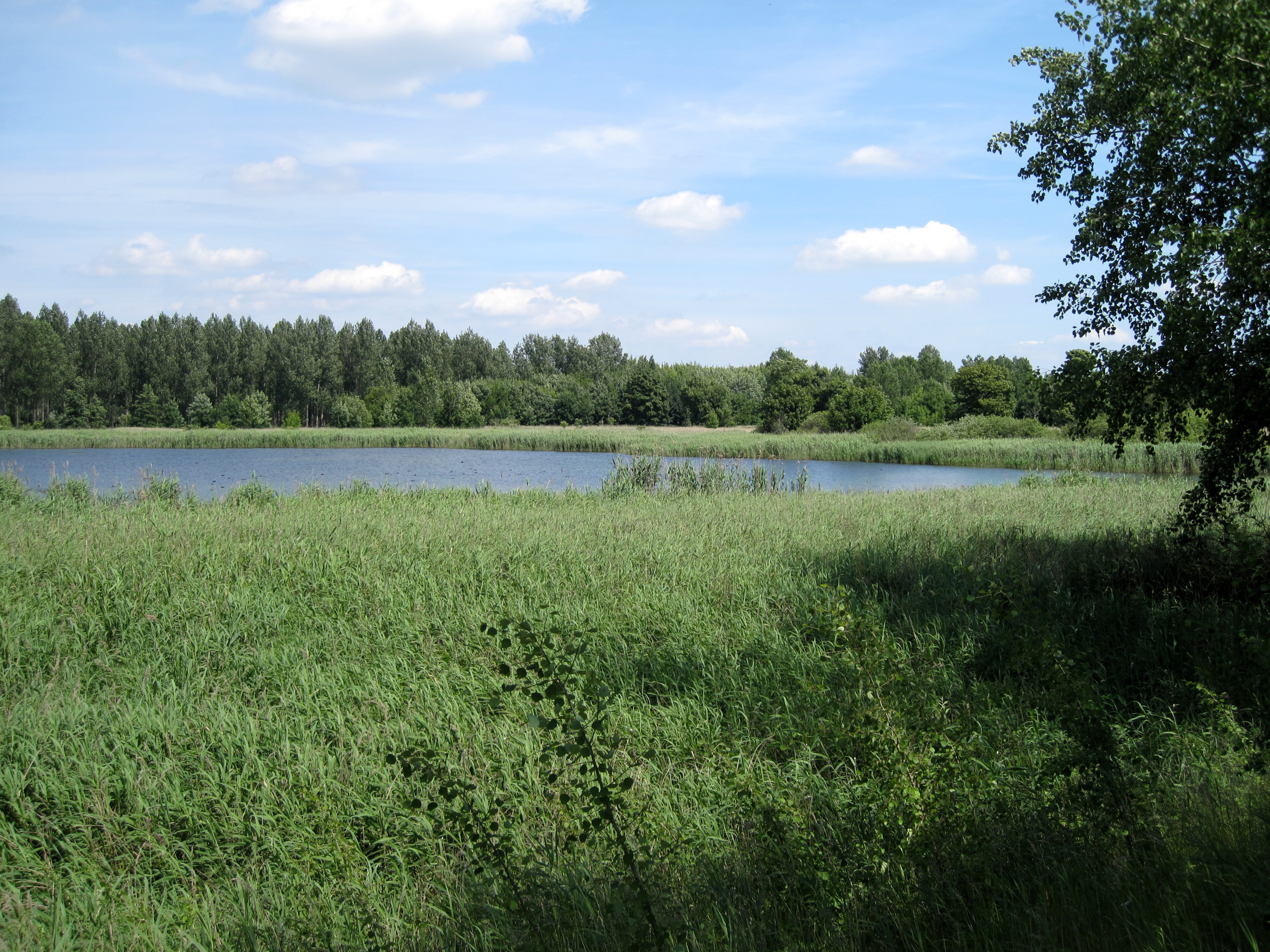 „Ententeich“ im Naturschutzgebiet „Karower Teiche“ in Berlin-Französisch Buchholz